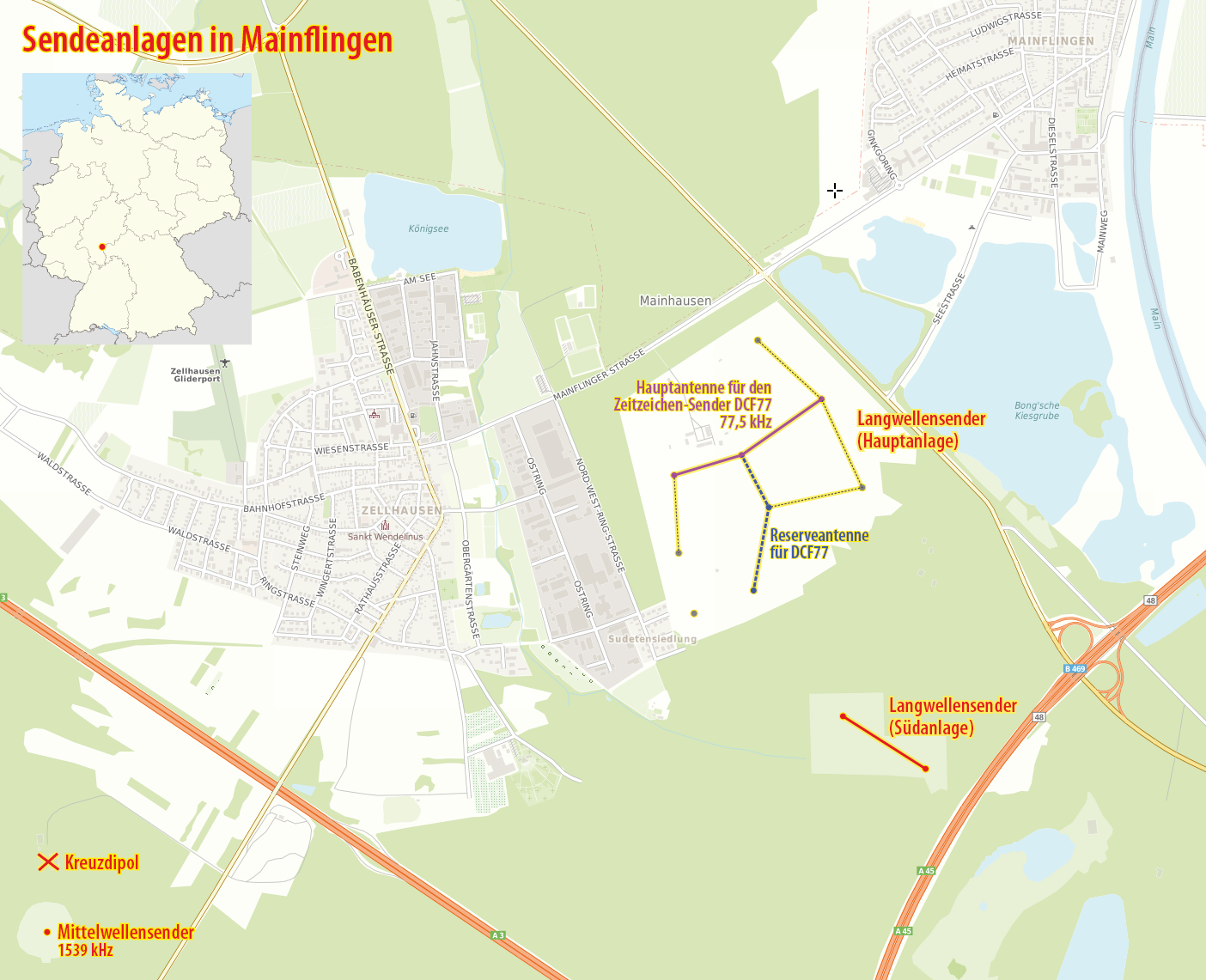 Karte der Sendeanlagen in Mainflingen